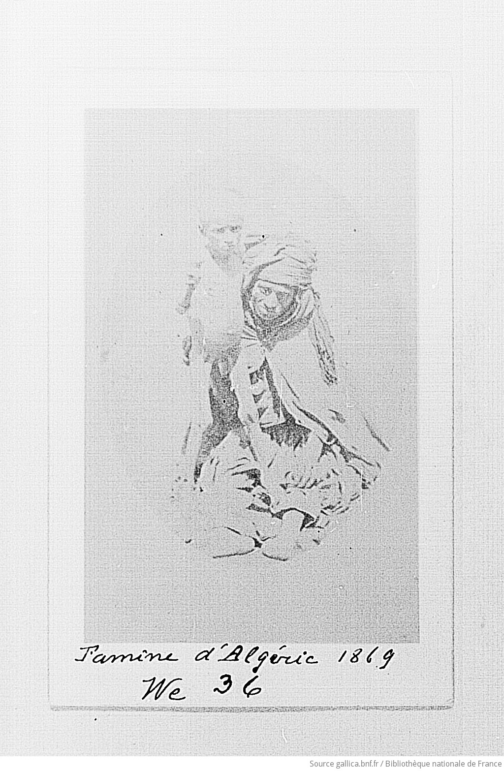 Français cadien: Phot. d'affamés durant la famine de 1869 (?) en Algérie. Don V. Largeau